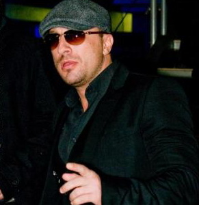 На премьере фильма «Возвращение мушкетёров» 4 февраля 2009 года